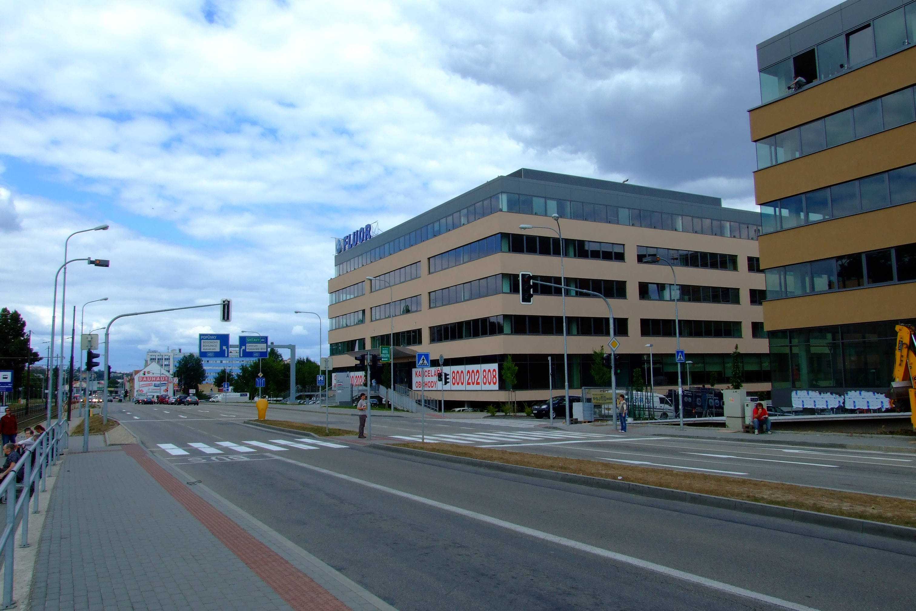 Brno-Štýřice - Vídeňská ulice